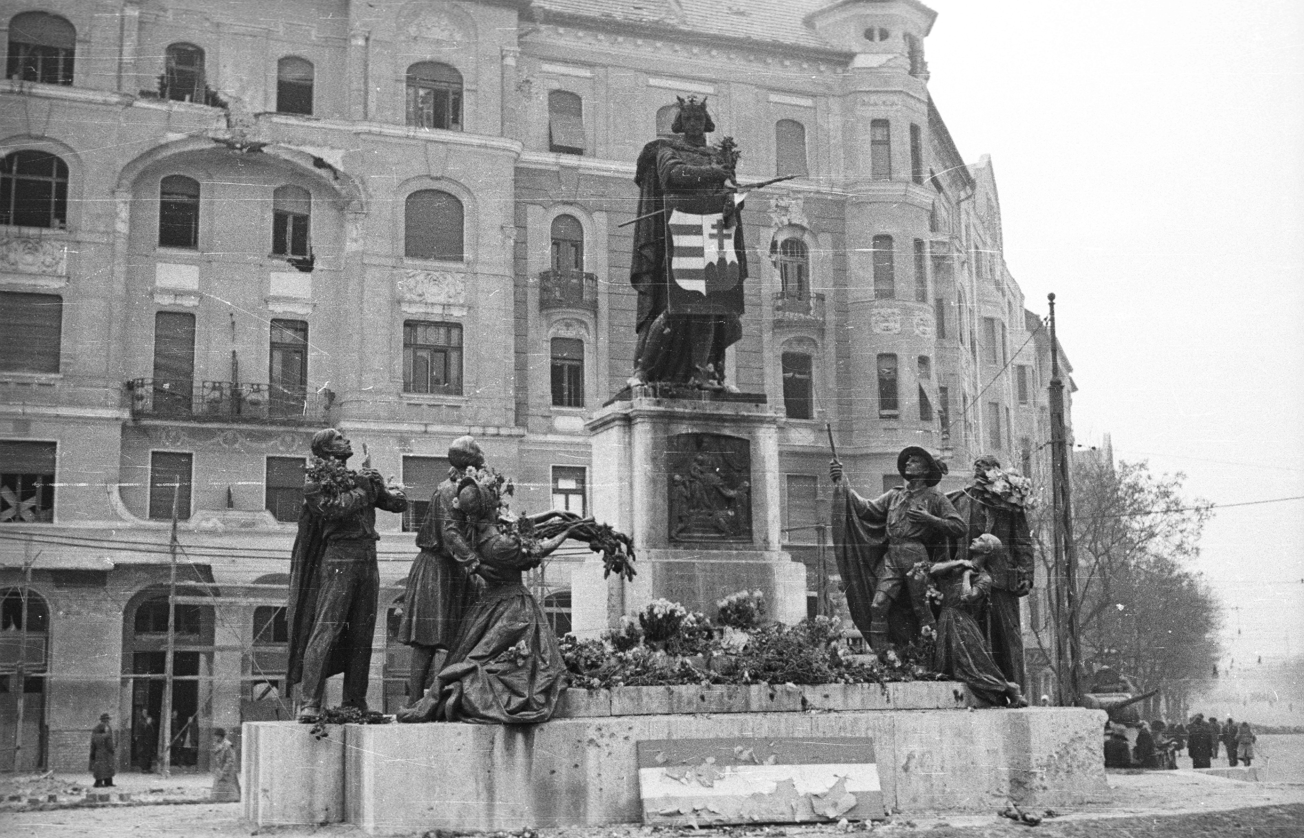 Móricz Zsigmond körtér, Szent Imre szobor (Kisfaludy Strobl Zsigmond), jobbra szemben a Fehérvári út torkolata. Location: Hungary, Budapest XI. Tags: sculpture, crest, war damage, Budapest, revolution Title: Móricz Zsigmond körtér, Szent Imre szobor (Kisfaludy Strobl Zsigmond), jobbra szemben a Fehérvári út torkolata.